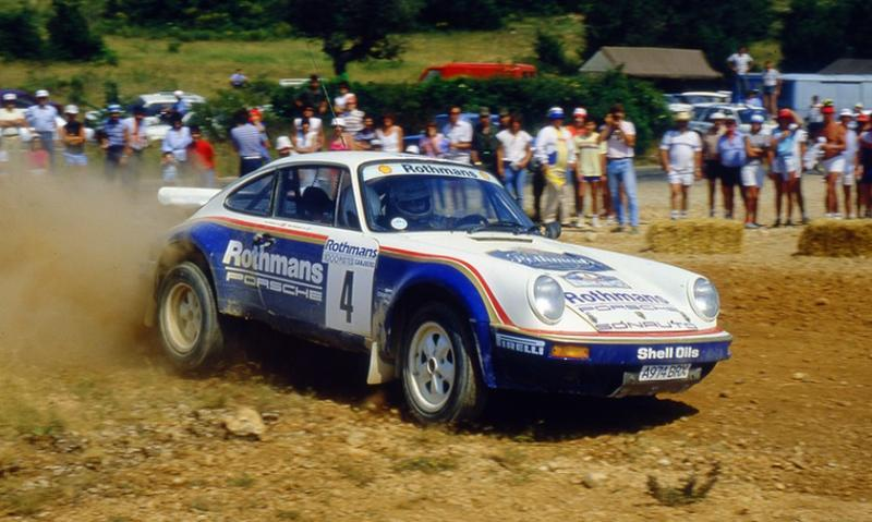 Henri Toivonen au rallye des 1000 pistes en 1984 sur Porsche 911 sc rs